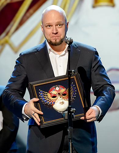 Фестиваль «Золотая маска» 2015 года